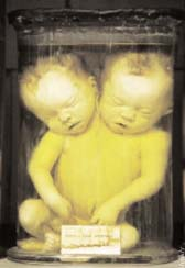 Un aspect de la collection de tératologie du musée d'anatomie de Montpellier